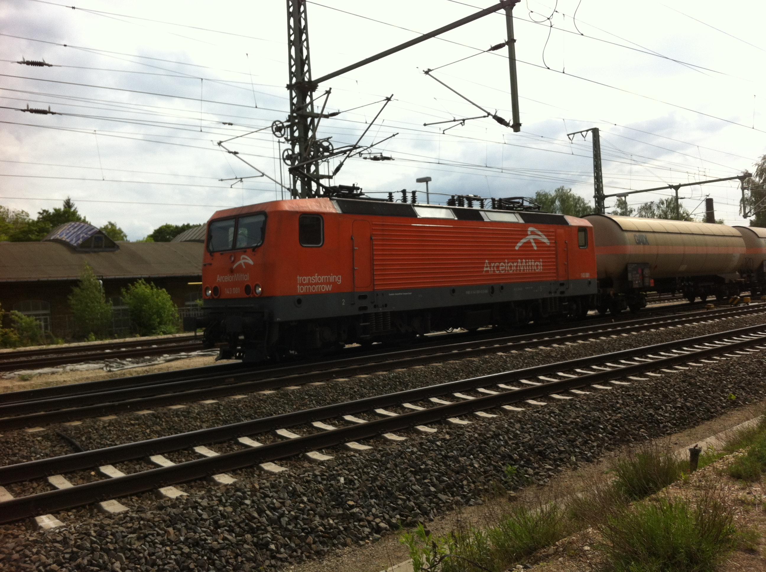 Arcelor 143 DB-Baureihe 143 001